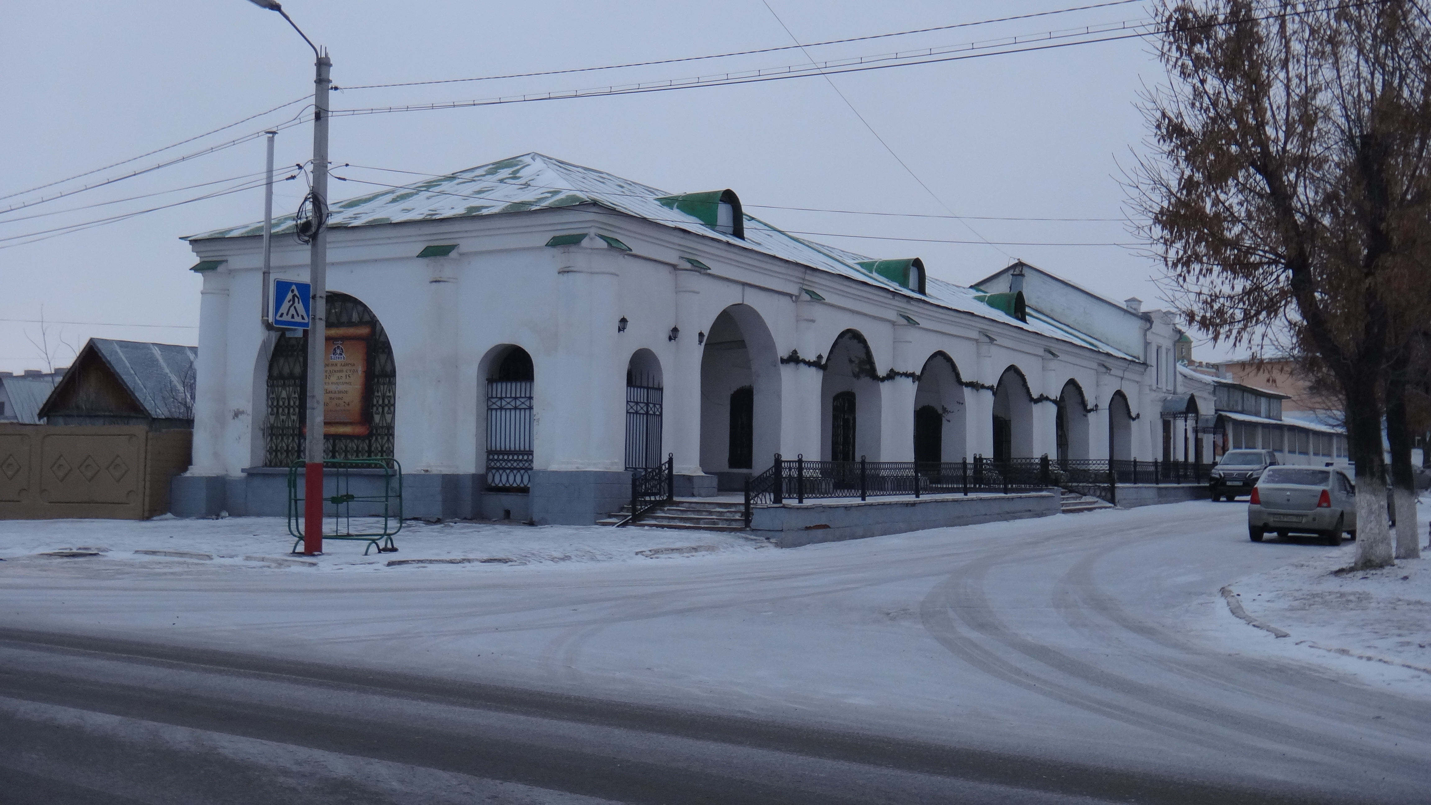 Murom, Vladimir Oblast, Russia